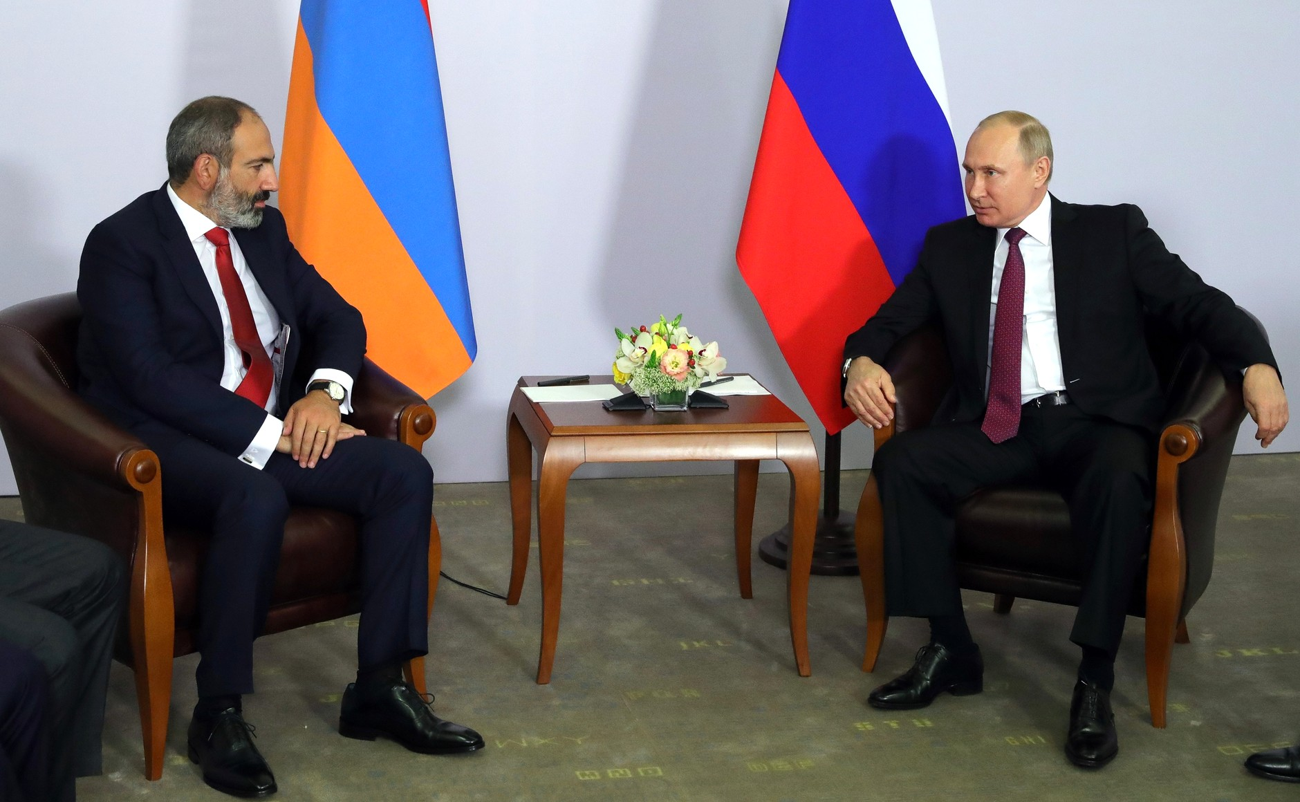 Встреча Президента России Владимира Путина с Премьер-министром Республики Армения Николом Пашиняном